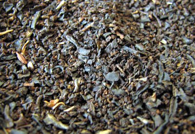 Assam tea